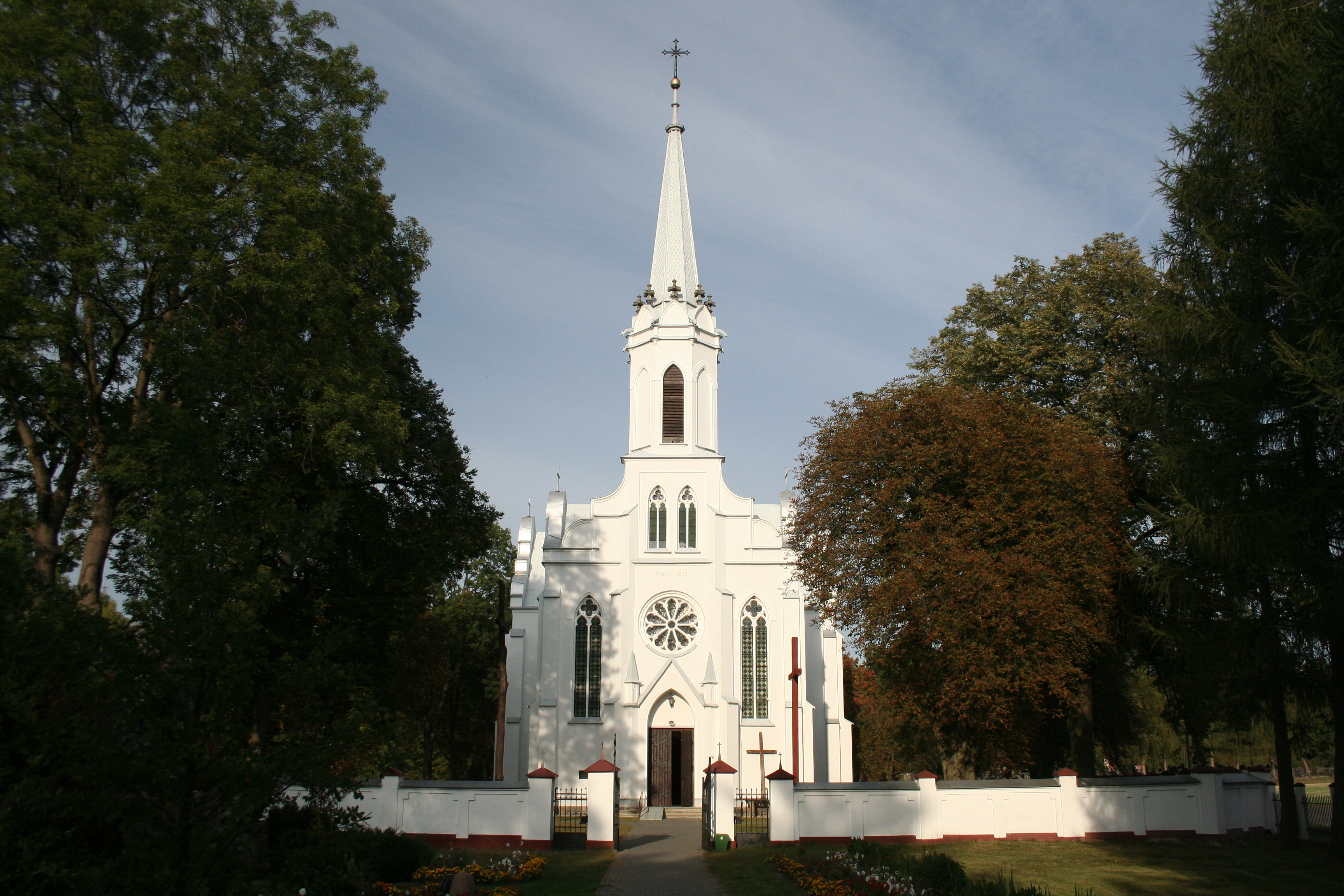 Jabłoń - zespół kościoła parafialnego p.w. św. Tomasza z Villanowy: kościół parafialny p.w. św. Tomasza z Villanowy, plebania, stary cmentarz (zabytek nr rejestr A/688 z 31.12.1974)